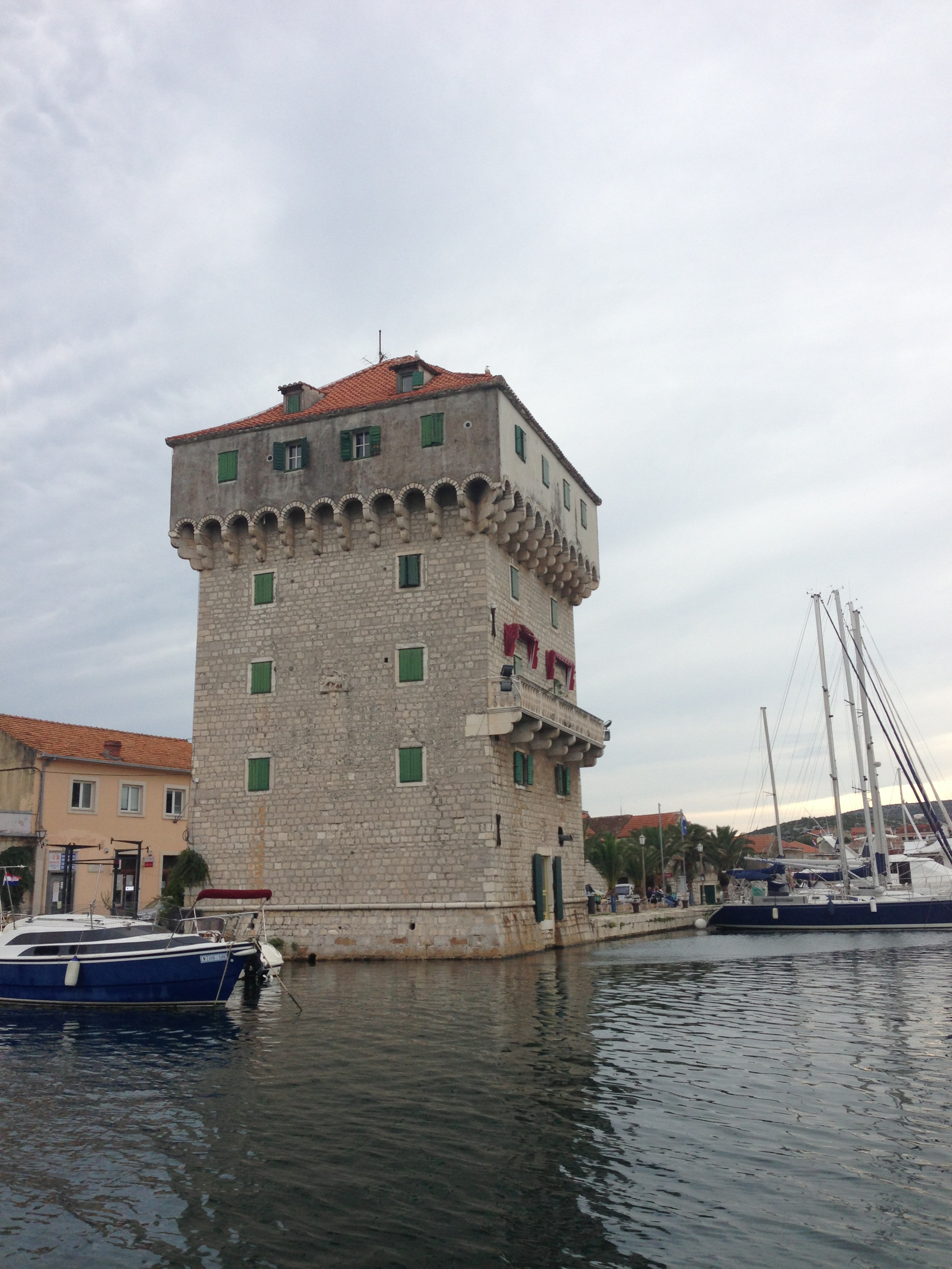 Turm in Marina von der Meerseite